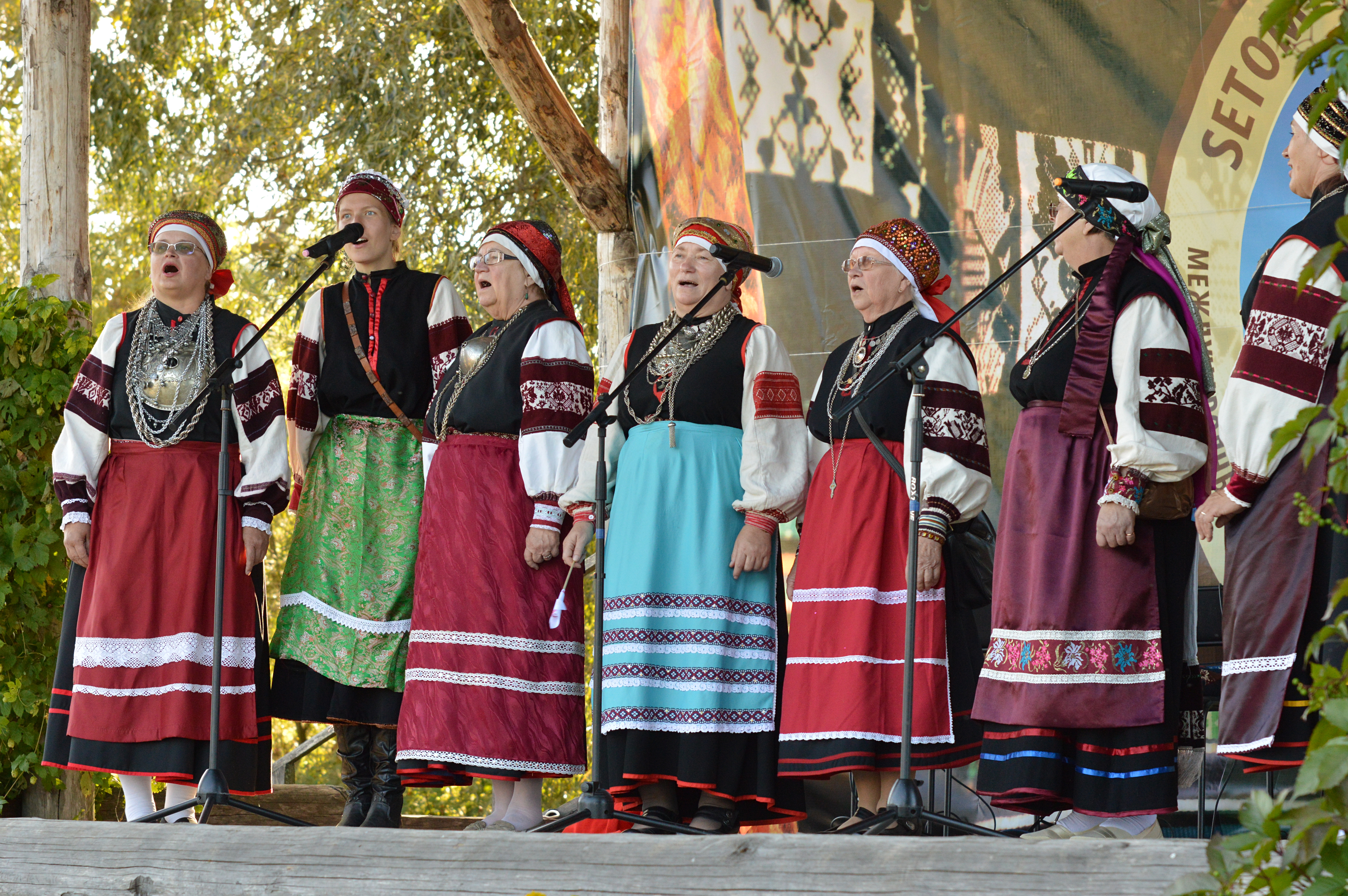 Sõsarõ. Seto kultuuri festival Radajal.